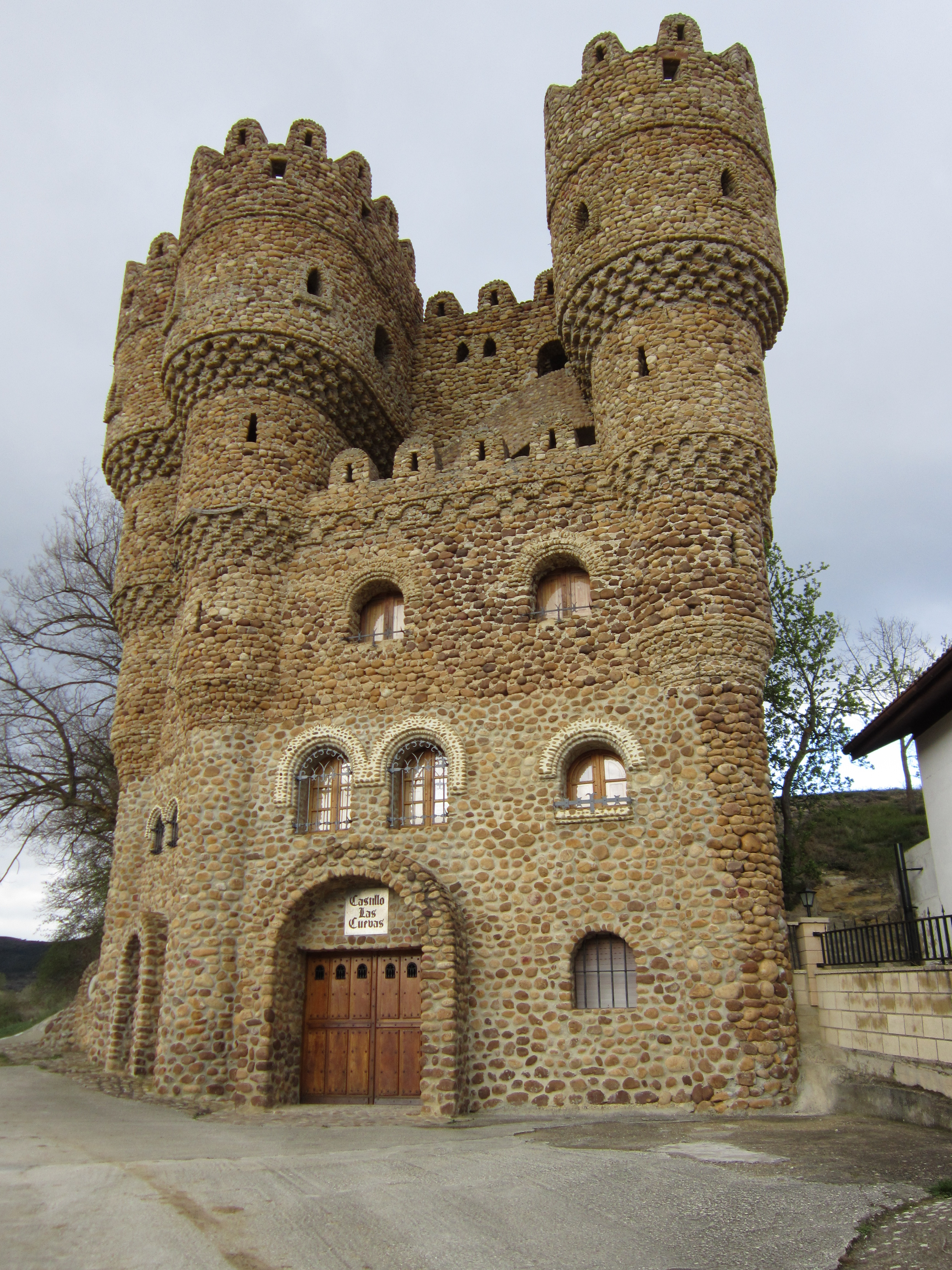 Fachada principal